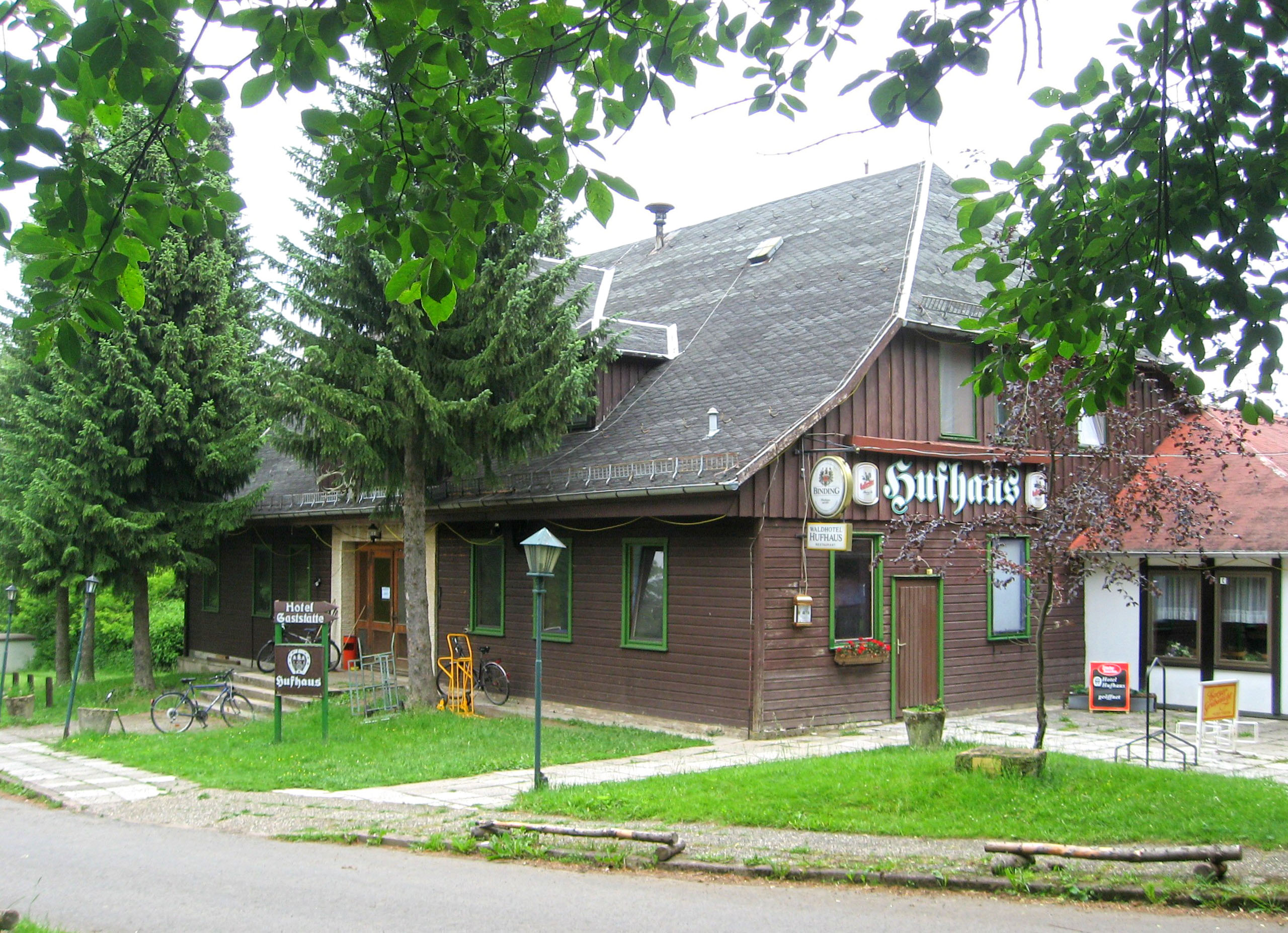 Gaststätte Hufhaus bei Ilfeld